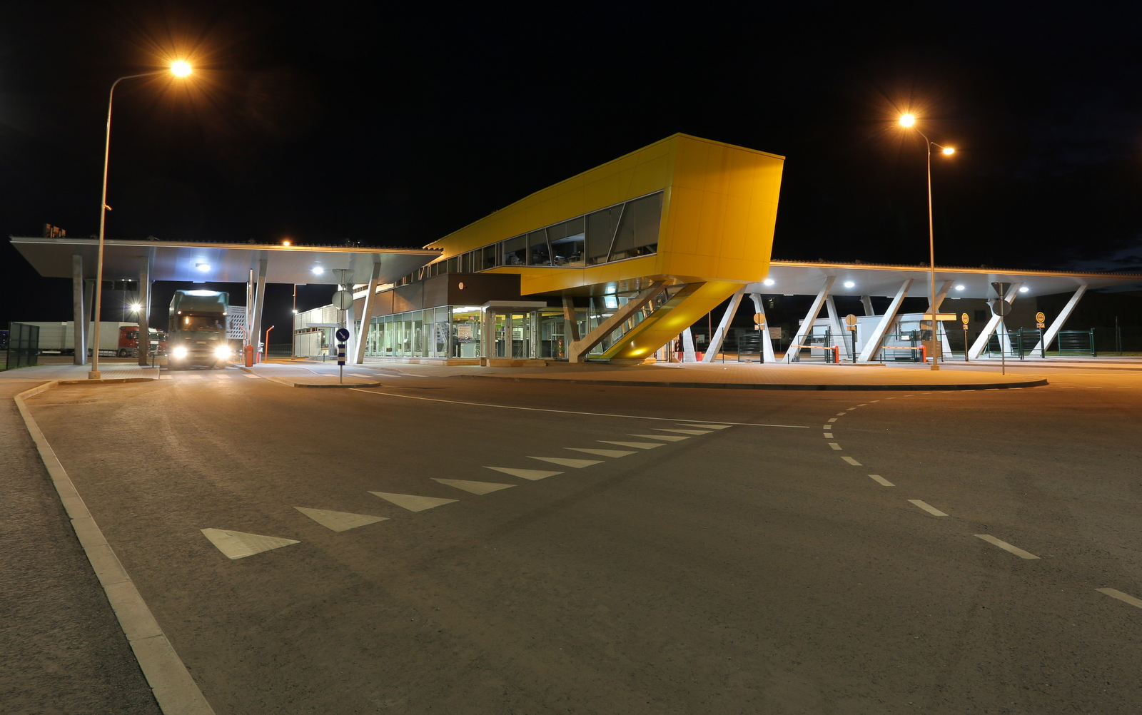 On kaks sissepääsu – vasakpoolne piirieelsesse veokite ootealasse, parempoolne Sillamäe vabatsooni ja sadama territooriumile. Hoones on teenindussaal autojuhtidele, kohvik ning kabinetid tolliametnikele.